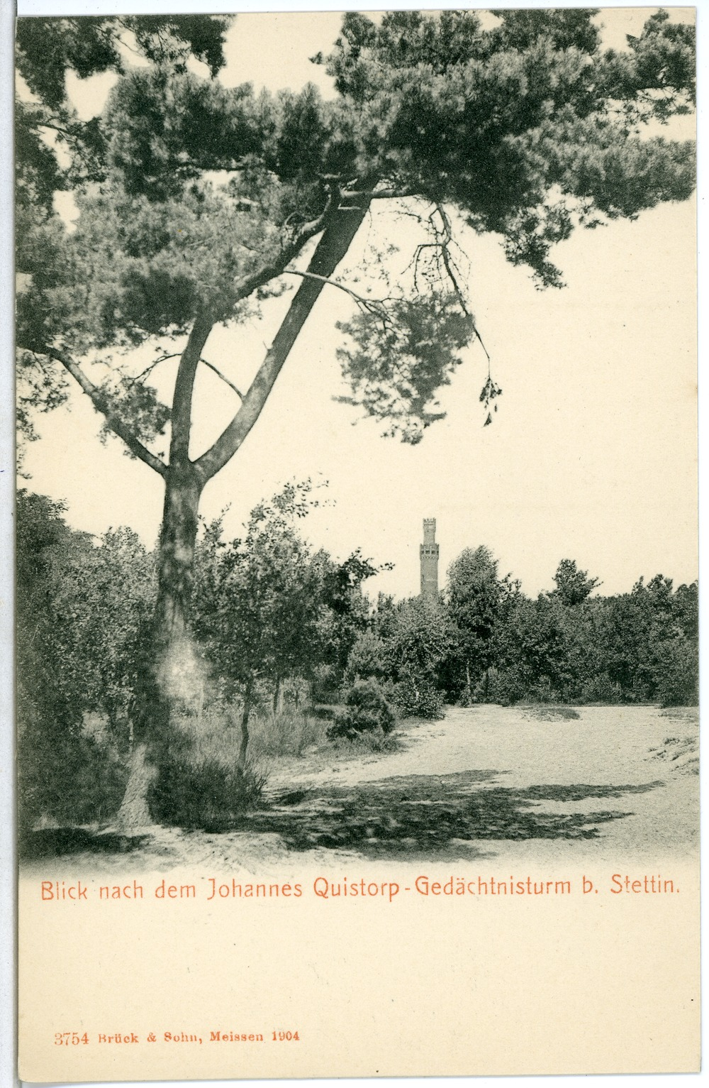 Stettin; Blick nach dem Joh.-Quistorp-Gedächtnisturm This postcard is from publisher Brück & Sohn in Meißen ( postcard has a unique number 03754 and is available in a higher resolution at the publisher. This images was uploaded in a cooperation project between Wikipedians and the publisher.